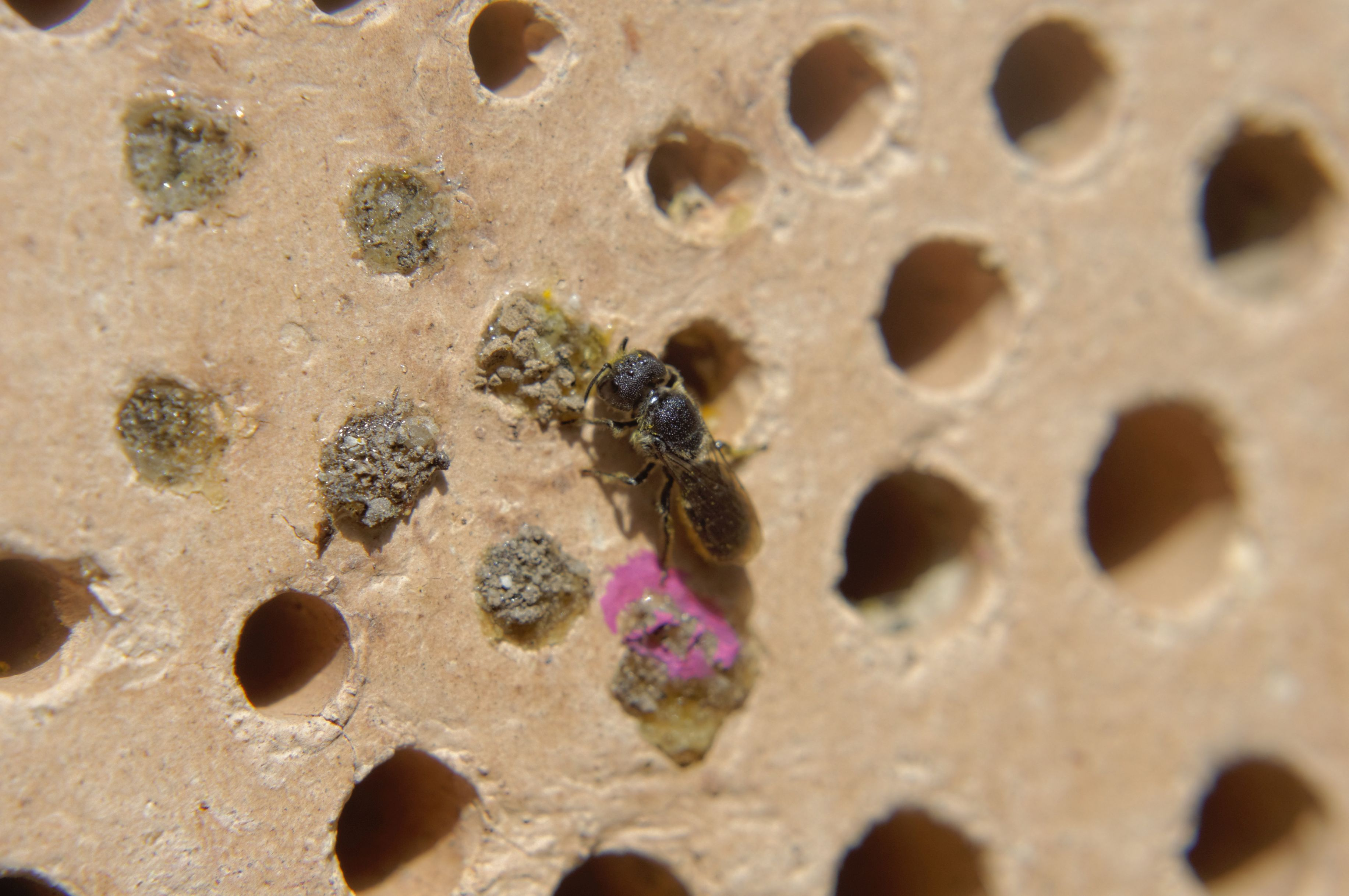 Bilder vom Insektenhotel